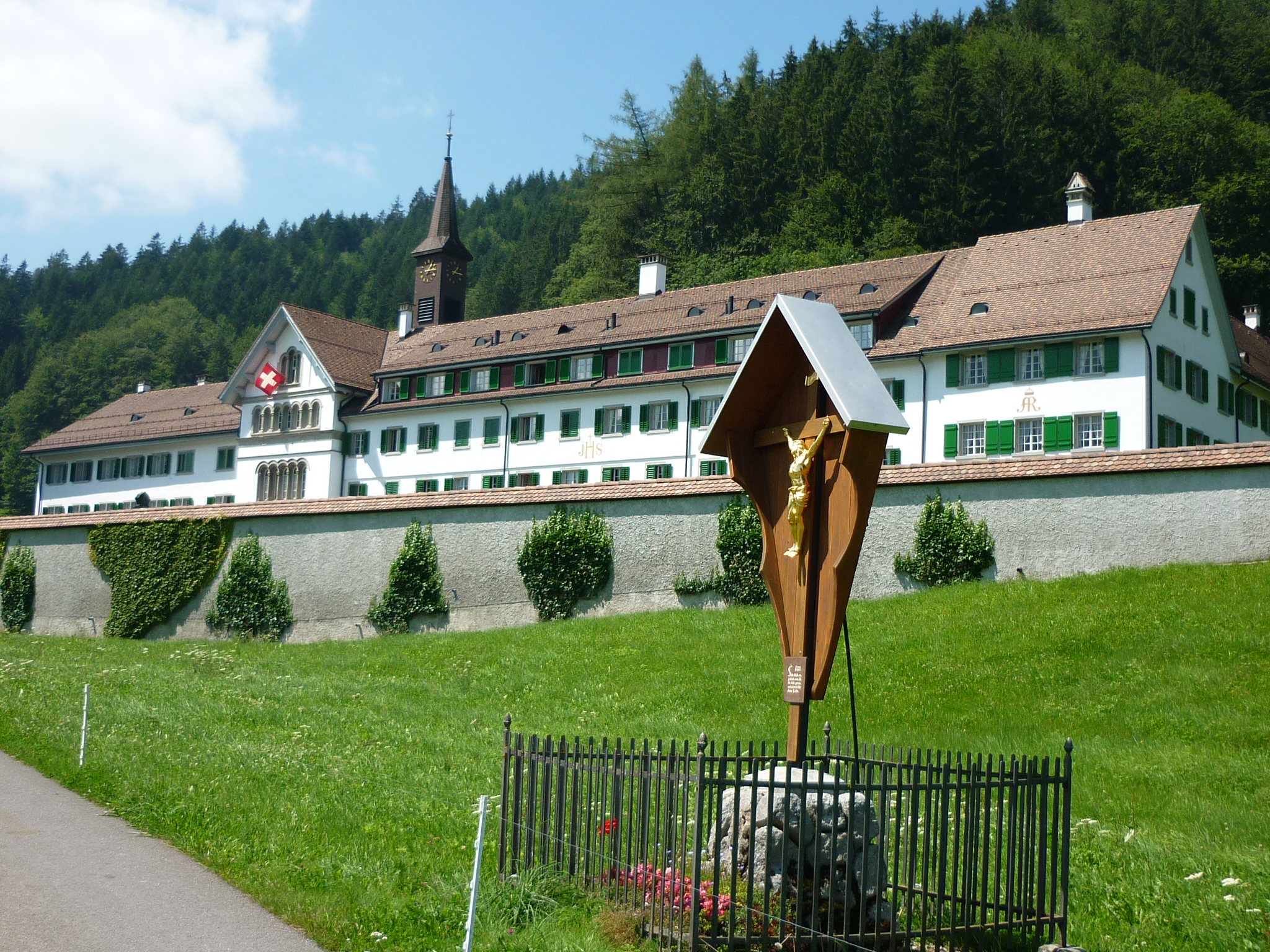 Kloster in der Au, Trachslau SZ, Schweiz